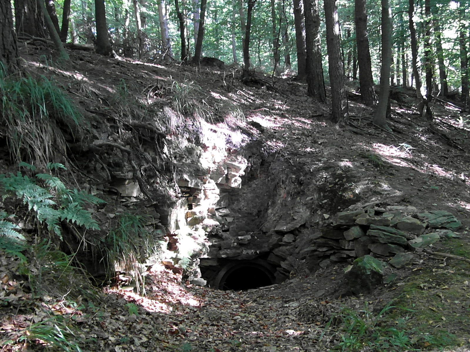 Der First des Mooshüttestollen ist ca. 10m hinter dem Mundloch aufgebrochen